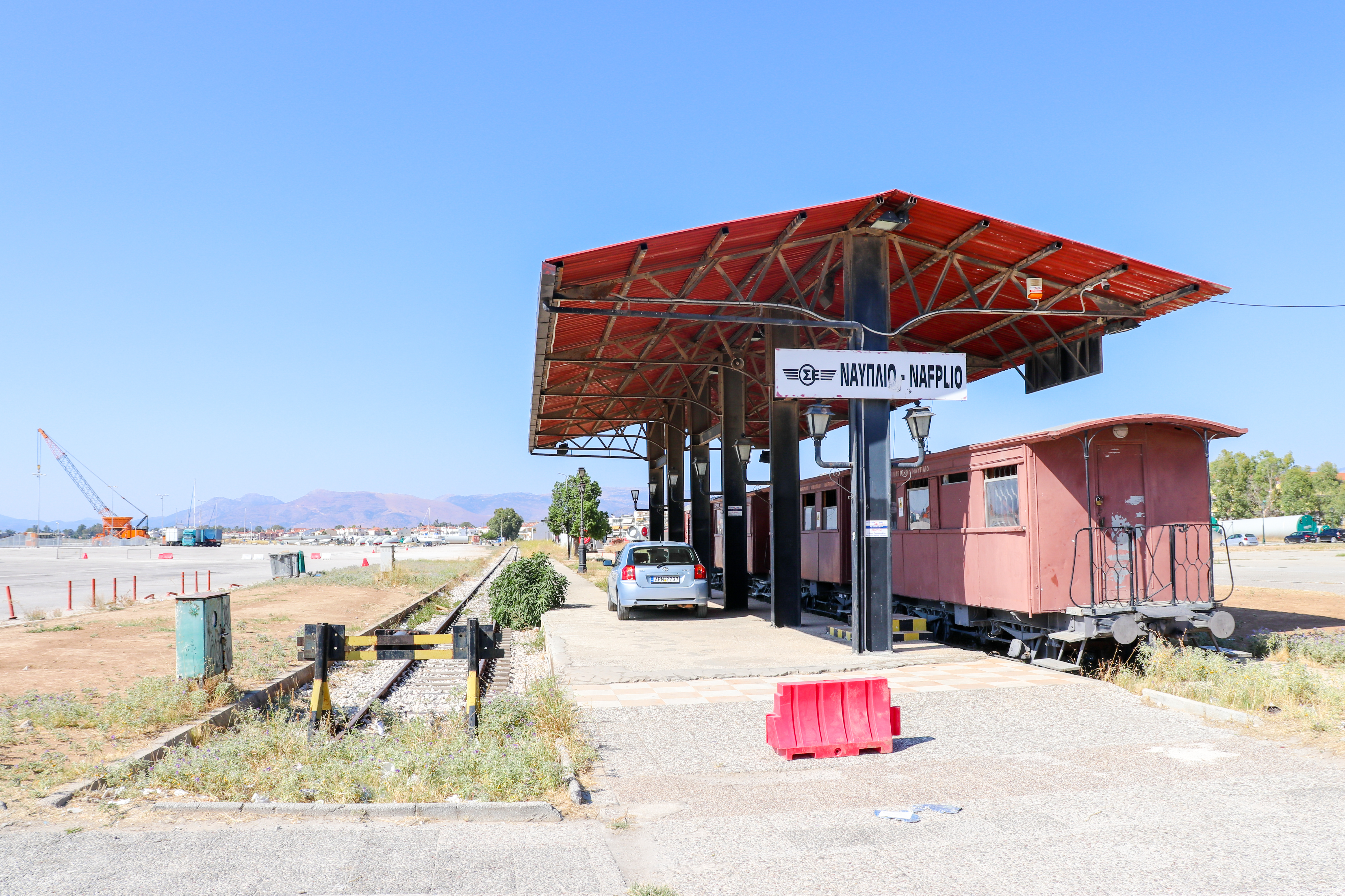 Железнодорожная станция Нафплион